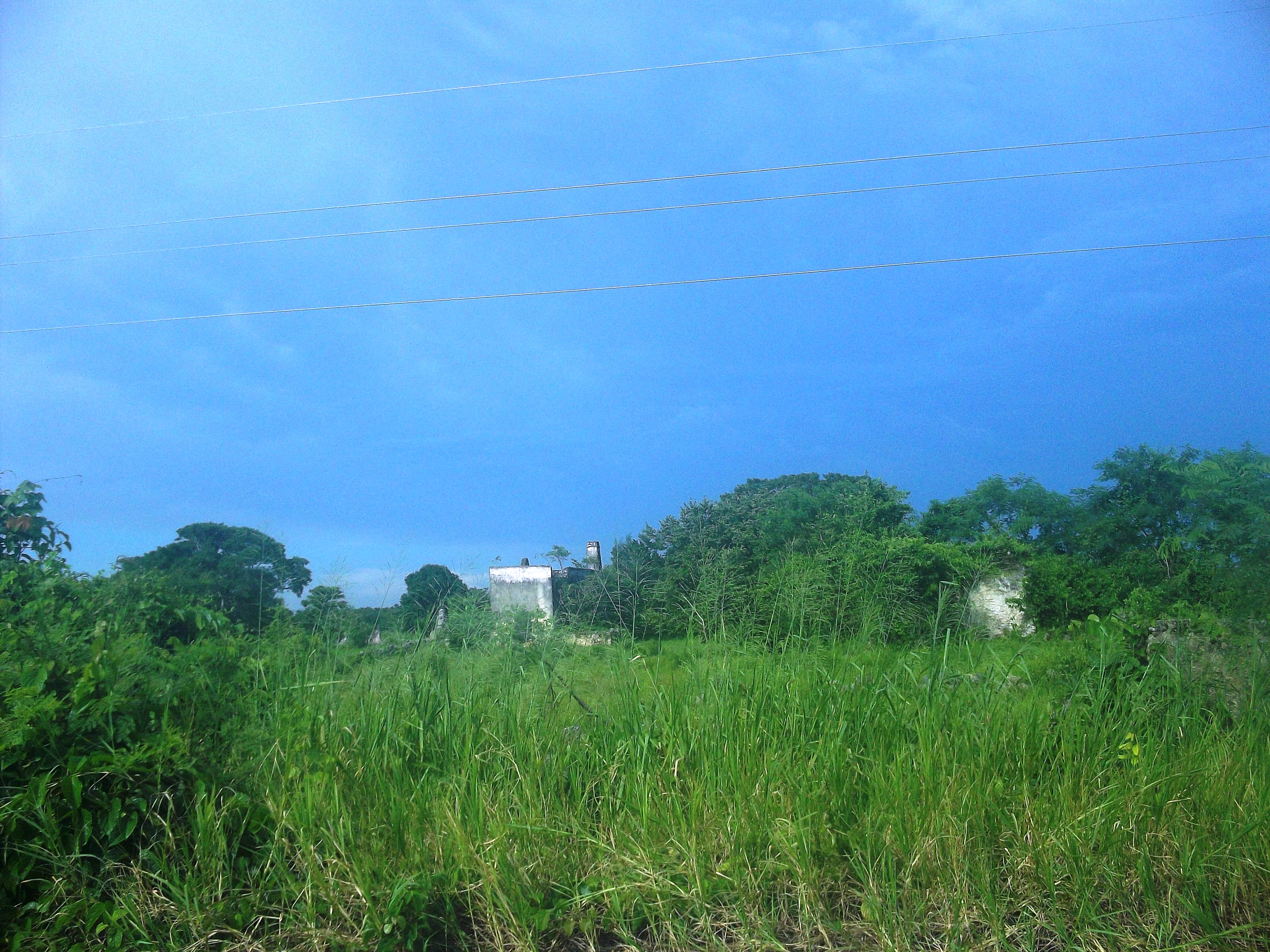 Vista de la hacienda de Balché, Yucatán.